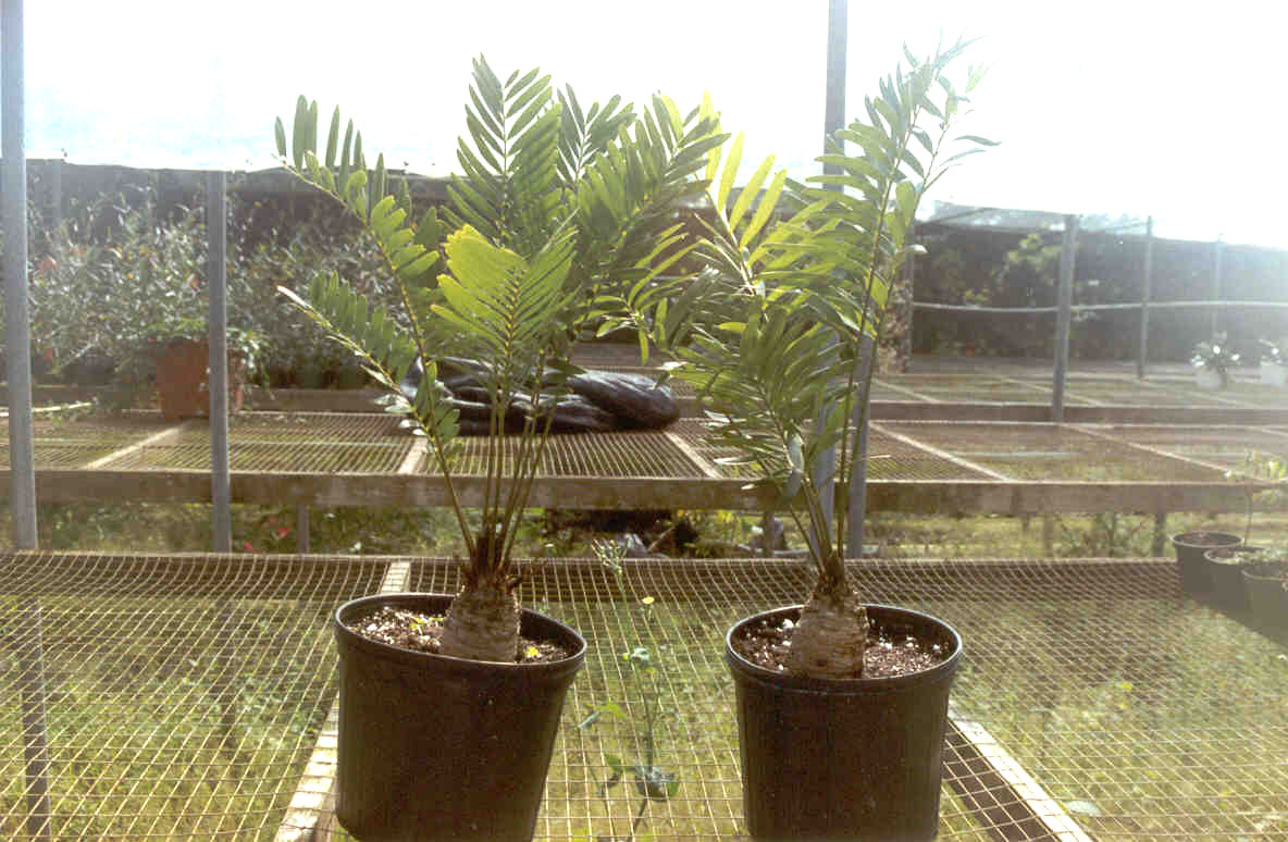 Plantas de Zamia amblyphyllidia (marunguey), Puerto Rico